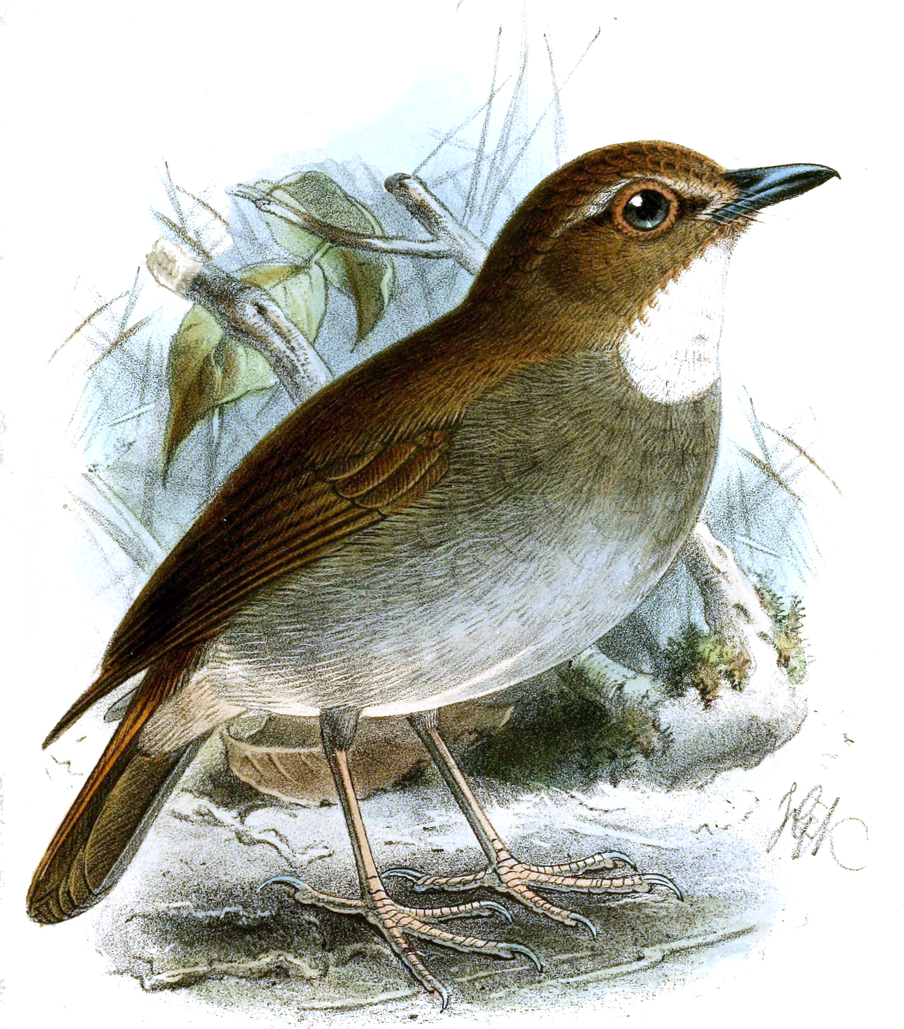 Rhinomyias gularis